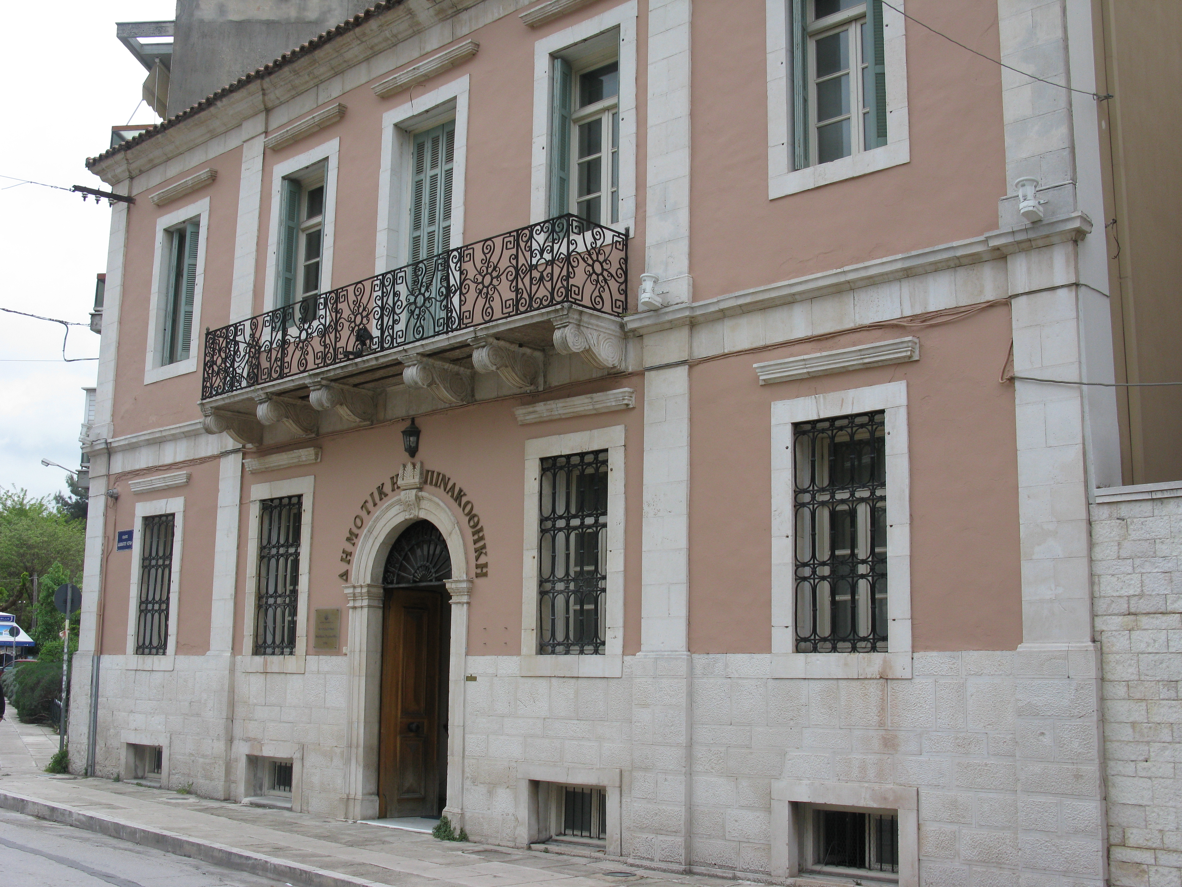 Δημοτική ΠΙνακοθήκη Ιωαννίνων.